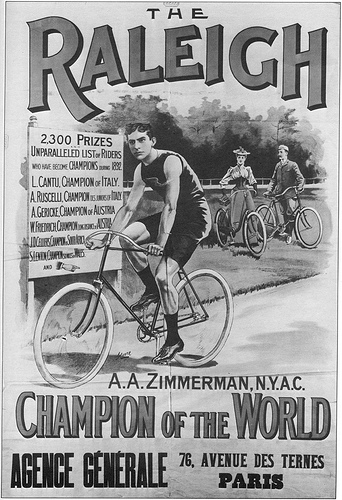 Affiche d'Arthur-Augustus Zimmerman